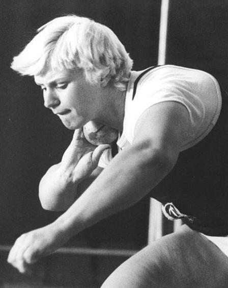 Factual corrections and alternative descriptions are encouraged separately from the original description. Additionally errors can be reported at this page to inform the Bundesarchiv. Original historic description: Ilona Slupianek ADN-ZB Mittelstädt 24.01.1980 Berlin: Ilona Slupianek stieß 21,52 m-Auf ausgezeichnete 21,52 m kam Kugelstoß-Europameisterin Ilona Slupianek am 23.01.1980 bei einem Hallen-Sportfest in der Hauptstadt. Die Berliner Dynamo-Sportlerin verfehlte damit ihre eigens DDR-Hallen-Bestleistung nur um sieben Zentimeter. Foto von einem früheren Wettkampf.